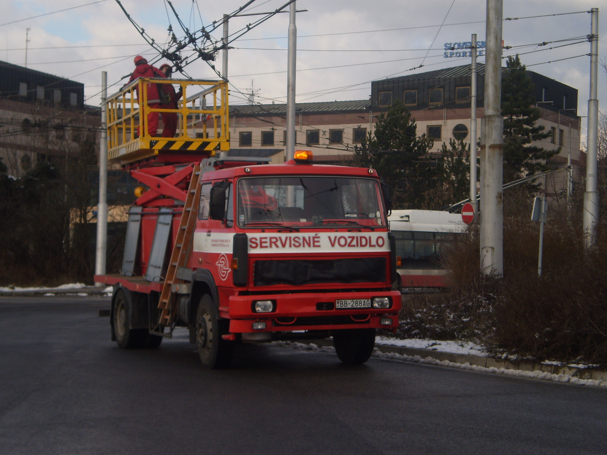 žst